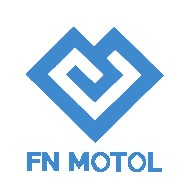 Nemocnice Motol